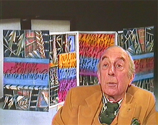 Portrait de Jean Cortot